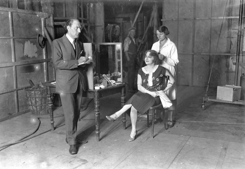 Filmschauspielerin Lotte Neumann